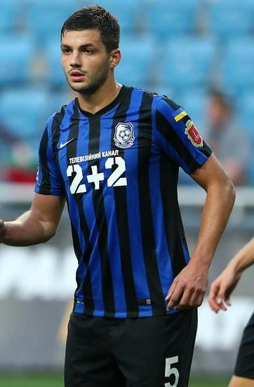 Давіт Хочолава - футболіст Чорноморця (Одеса)